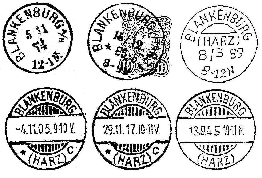 Stempelformen wie sie auch in Blankenburg zu Einsatz kamen aus den Jahren 1871 bis in Enddreißiger Jahre